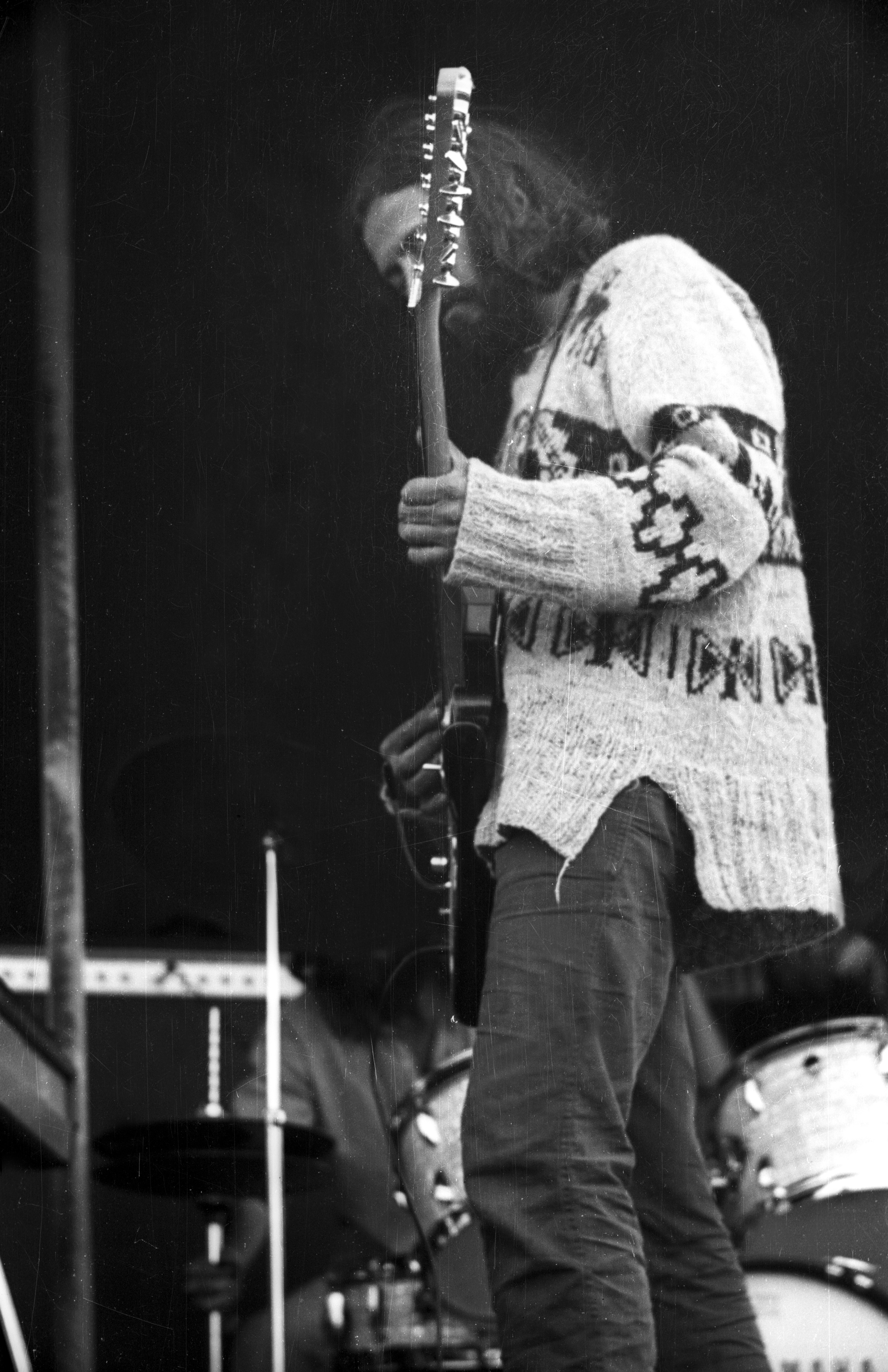 Eduardo Alquinta Espinoza (Valparaíso, 22 de enero de 1945 — Coquimbo, 15 de enero de 2003), más conocido como "Gato" Alquinta por sus amigos y seguidores, fue un músico chileno, guitarrista y vocalista de la banda chilena Los Jaivas por casi cuarenta años.